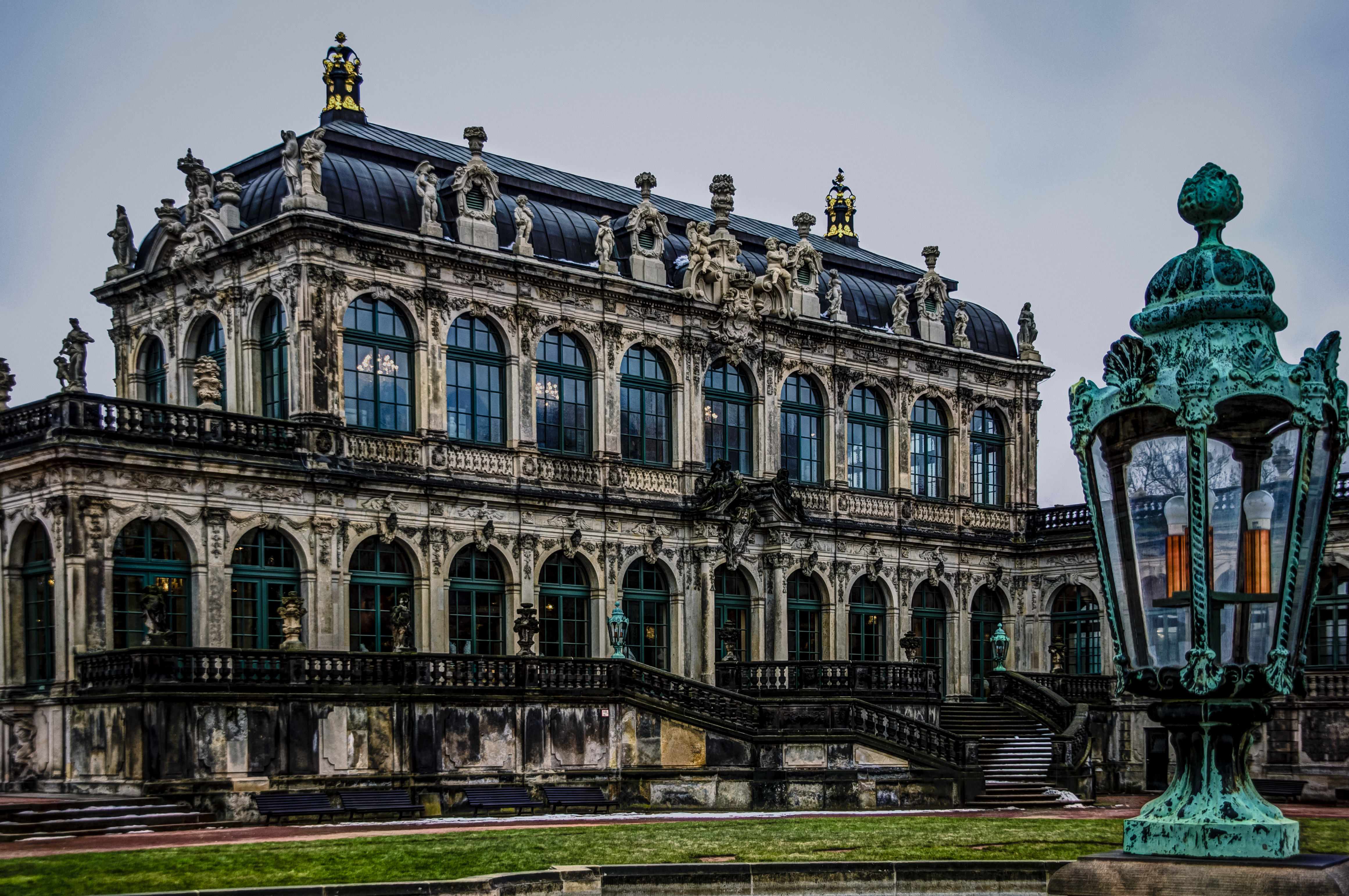 Dresden, Zwinger, Porzellanpavillon